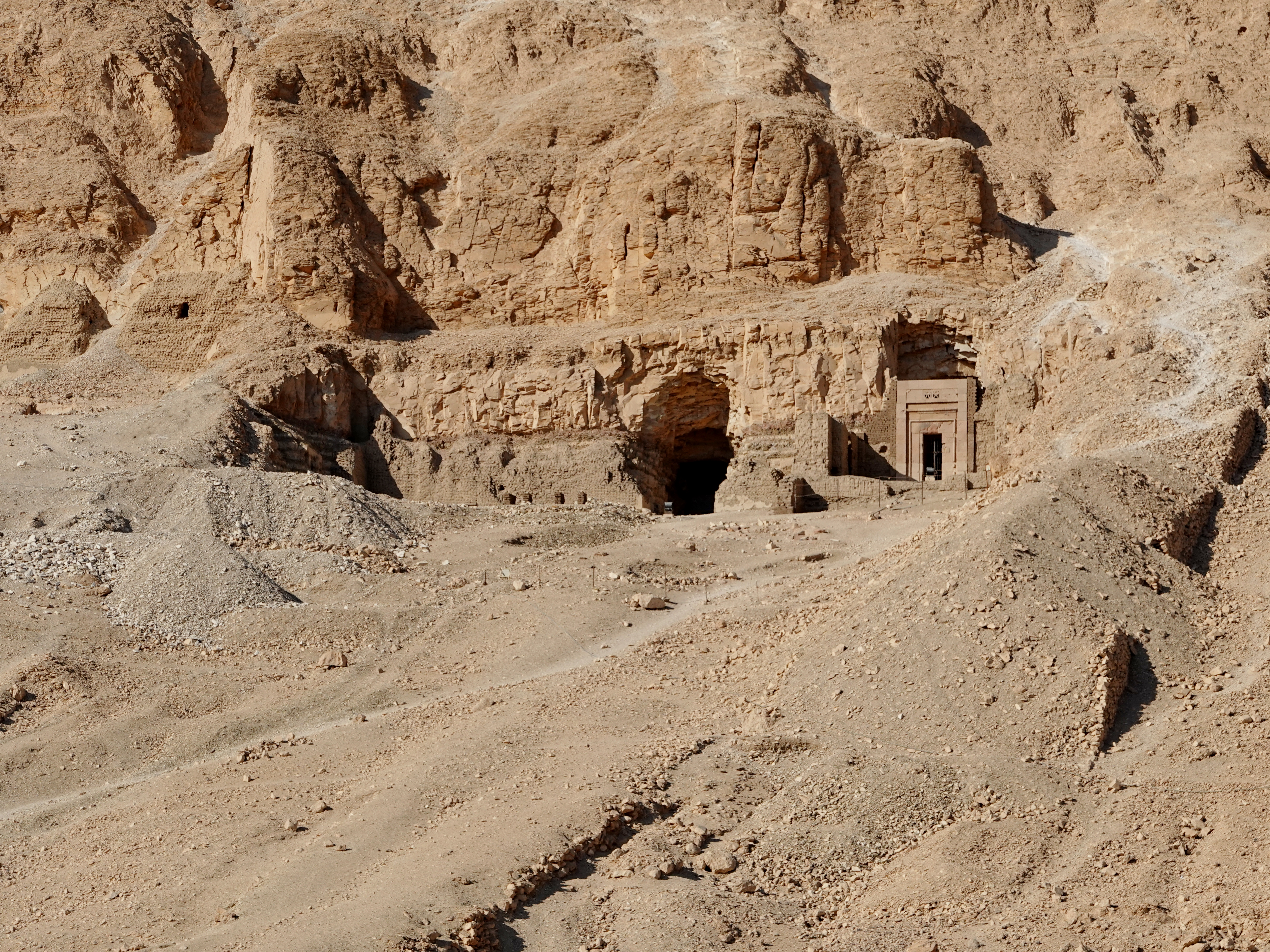 Felsengräber des Senenmut (TT 353) und Nespekaschuti (TT 312) in Deir el-Bahari (arabisch für „Nordkloster“) in Theben-West (Luxor), Ägypten